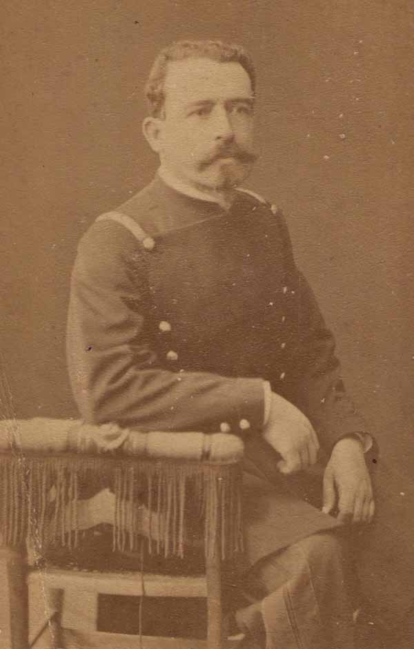 Ambrosio Letelier Rojas, de la Expedicion Letelier en Peru 1881